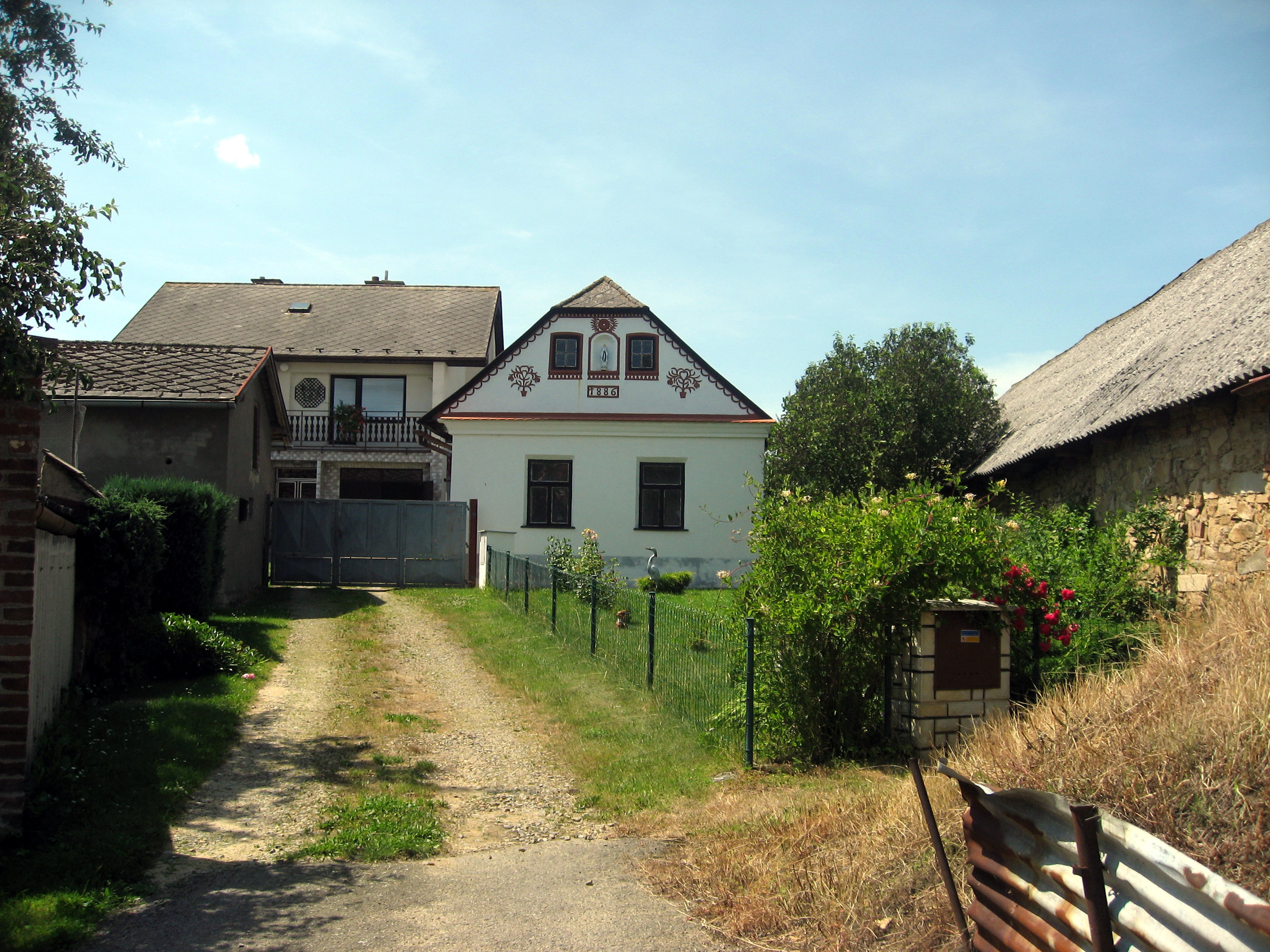 Hurtova Lhota - venkovský dům čp. 39 - kulturní památka